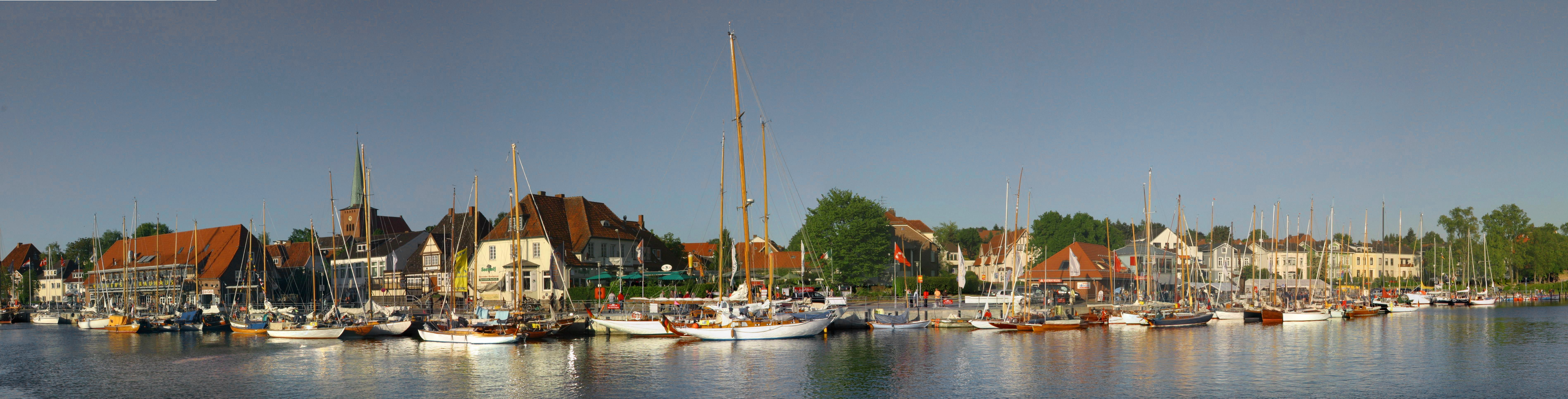 Panorama Max-Oertz-Rregatta 2008